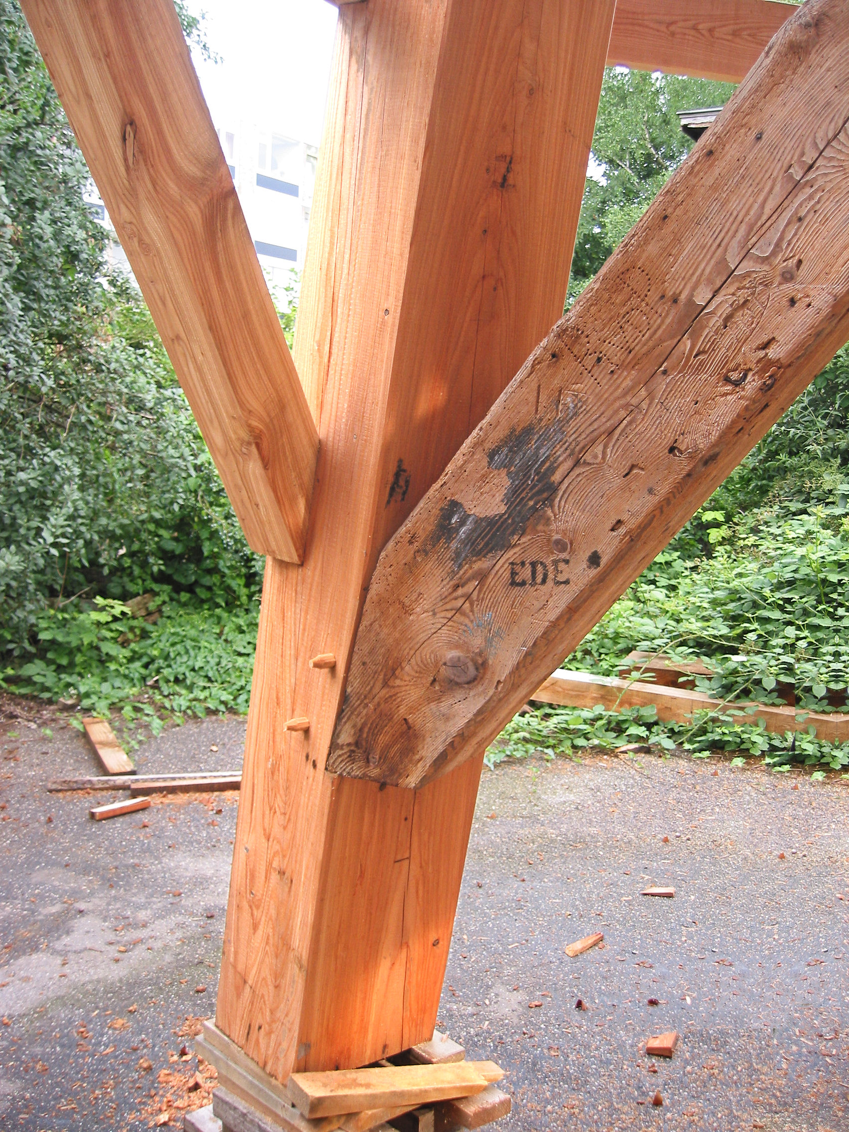 Restauratie houten achtkant van de Concordia molen te Ede 22 juni 2007. De oude korbeel met de nieuwe stijl.